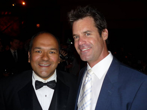 Description Tuc Watkins aux Prix GLAAD Media en 2008 Date2009Source [1] Tuc Watkins aux Prix GLAAD Media en 2008